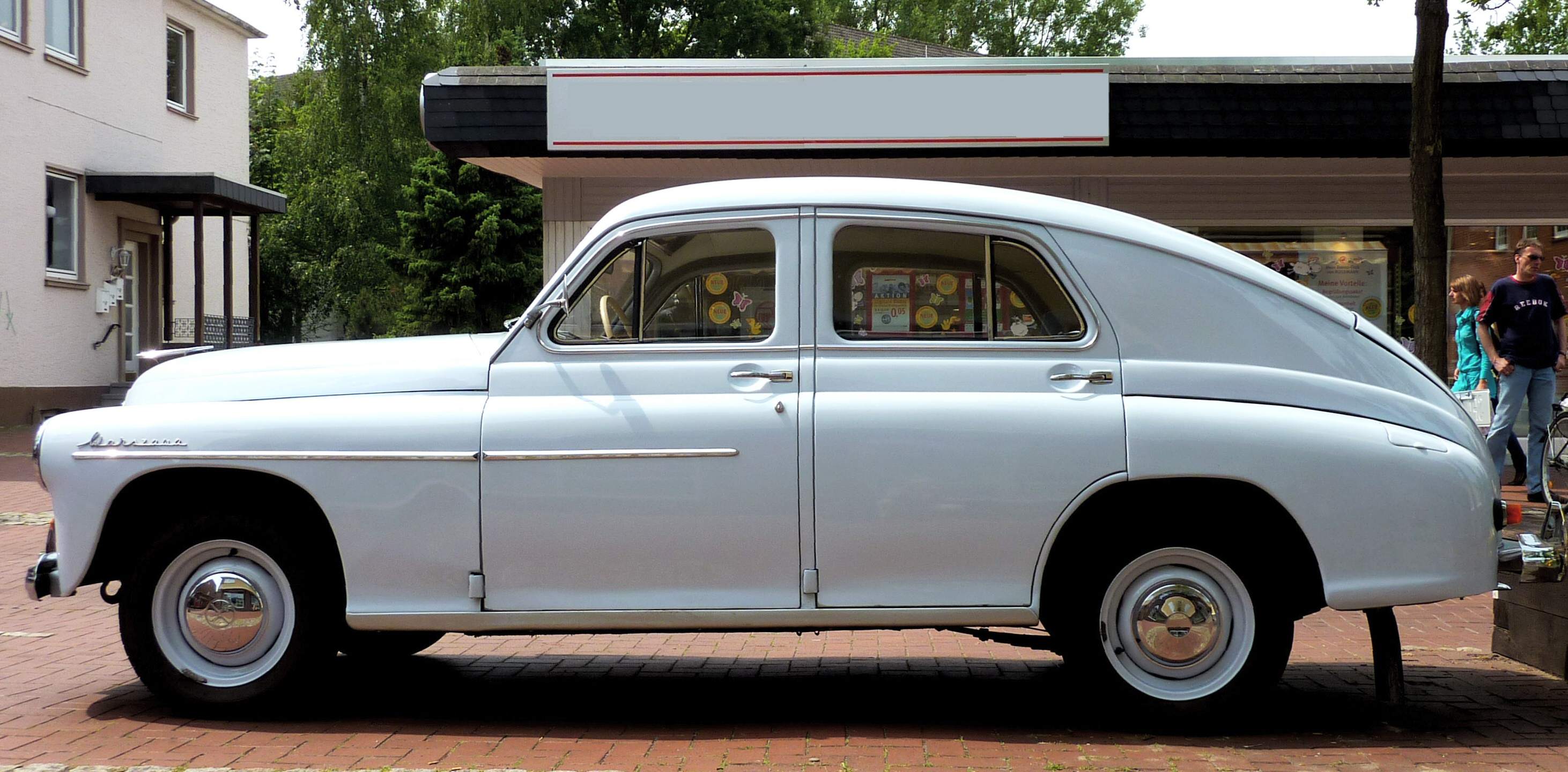 FSO Warszawa 201/202, gebaut in Polen. Lenkradschaltung, Sitzbank vorne.